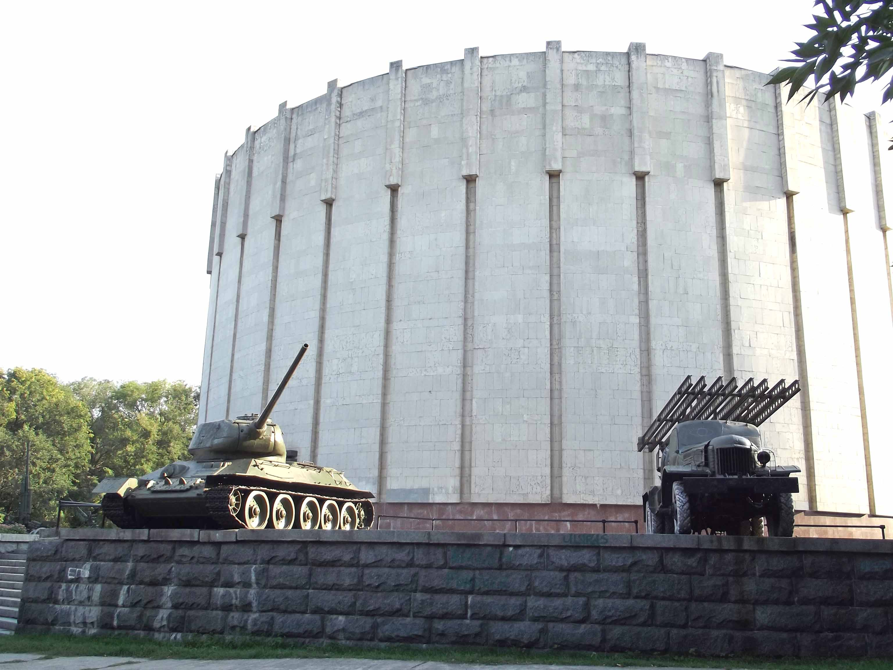 Диорама "Битва за Днепр"